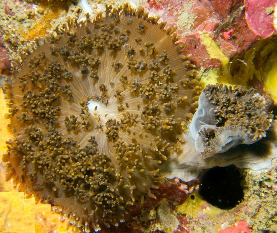 Reproducción asexual por brotes ("by budding") de Rhodactis indosinensis, Koh Phangan, Tailandia